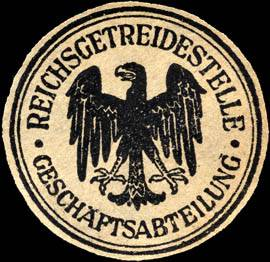 Sealing stamp Title: Reichsgetreidestelle - Geschäftsabteilung Description: grau, schwarz Place: size: 3 cm